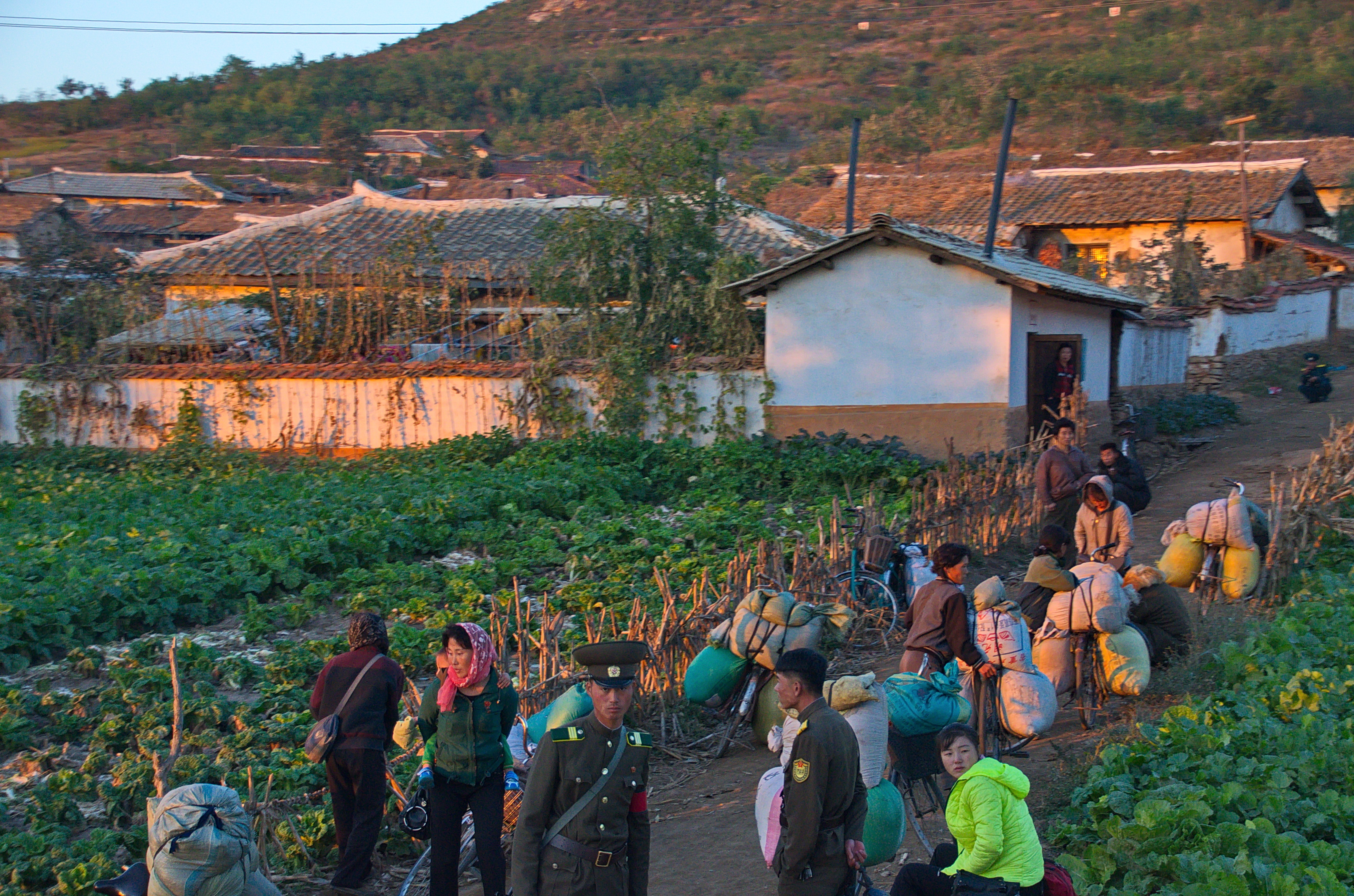 Nordkorea 2015 - bei Kangso